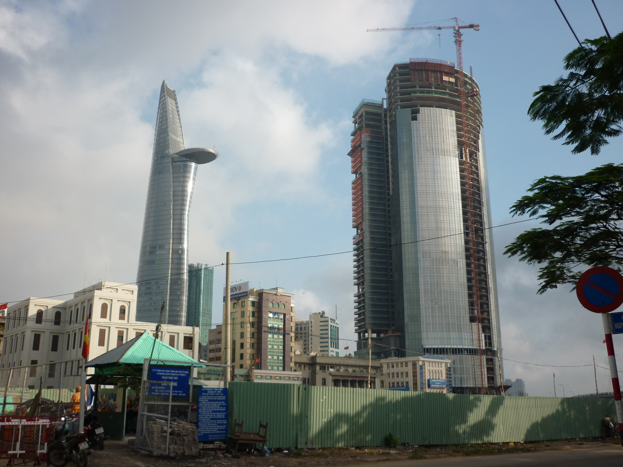 Hai tòa cao ốc cao nhất thành phố Hồ Chí Minh, bên trái là Bitexco Financial Tower & bên phải còn đang xây là Saigon M&C Tower.